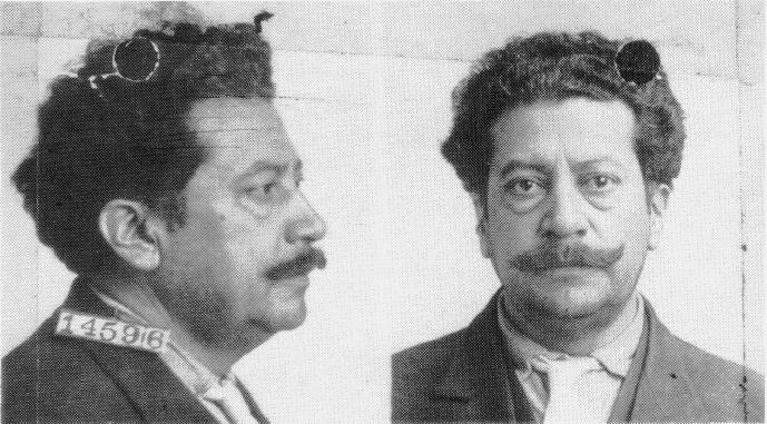 Ricardo Flores Magón periodista y anarquista mexicano preso en 1920.